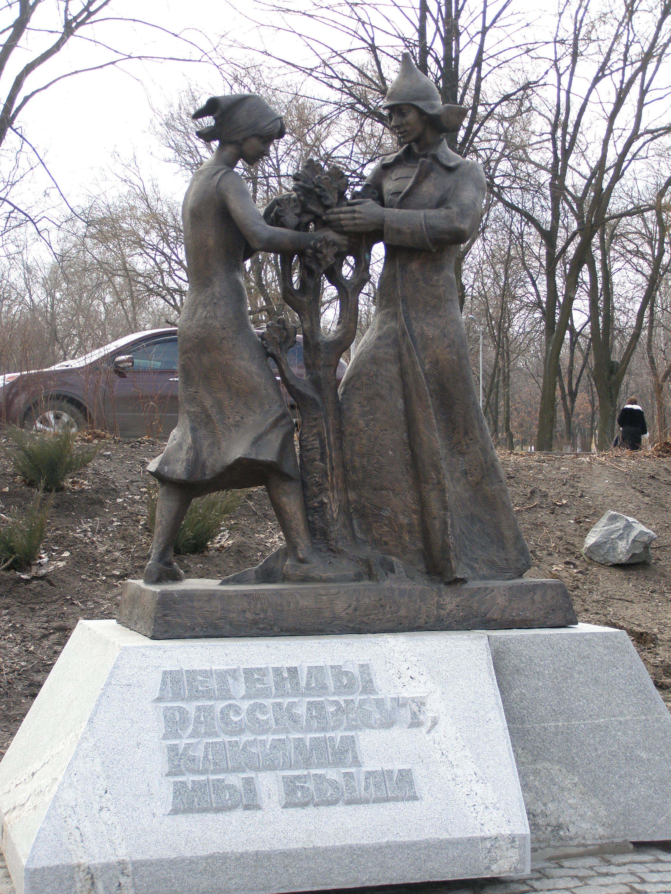 Памятник комсомольцам Днепропетровщины